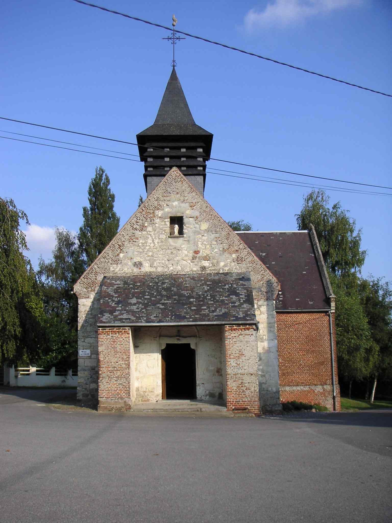 église d'Audigny (Aisne, France) prise par LonganimE le 13 septembre 2005